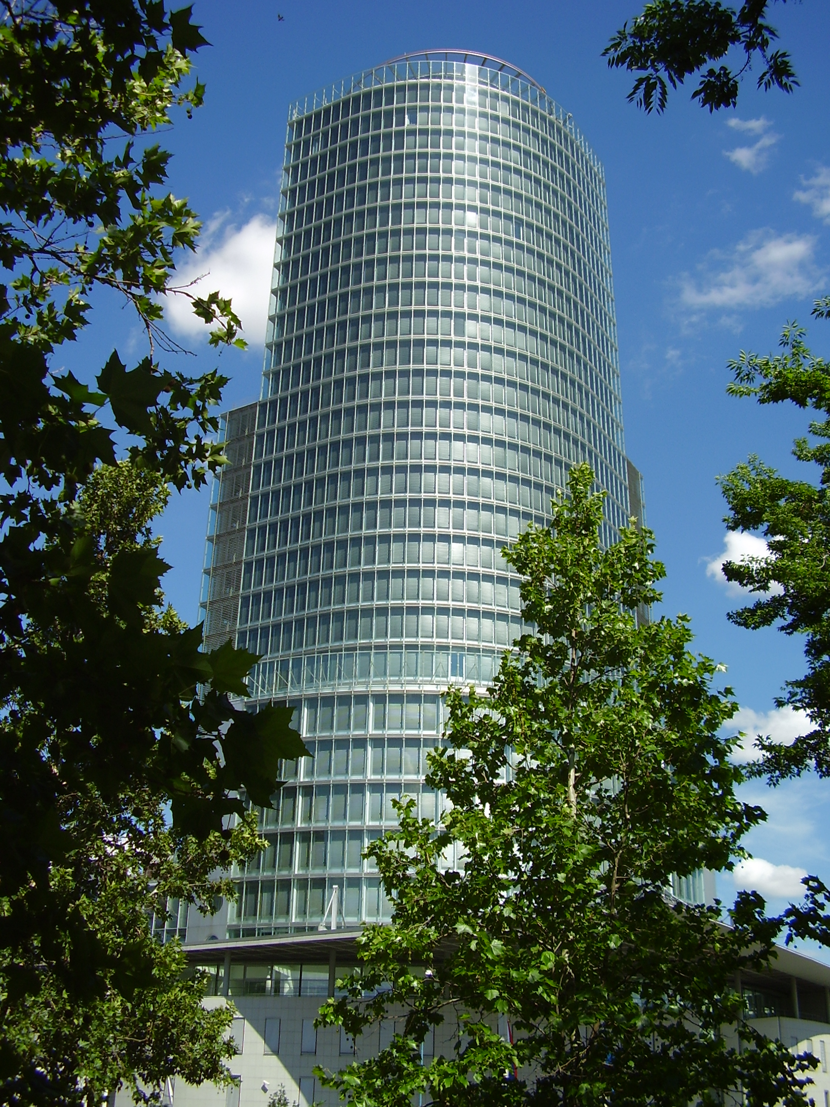 Bratislava